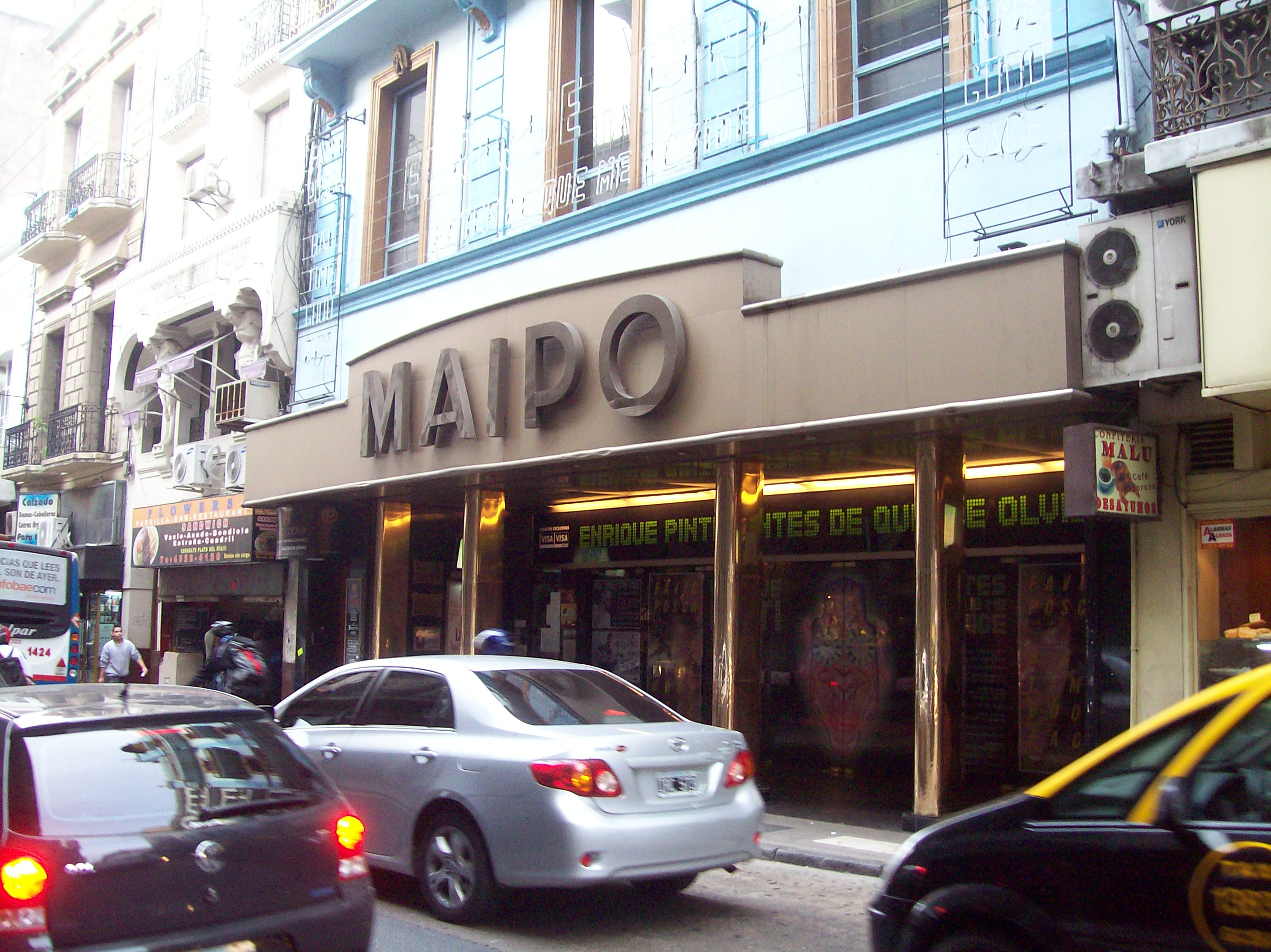 Frente del Teatro Maipo